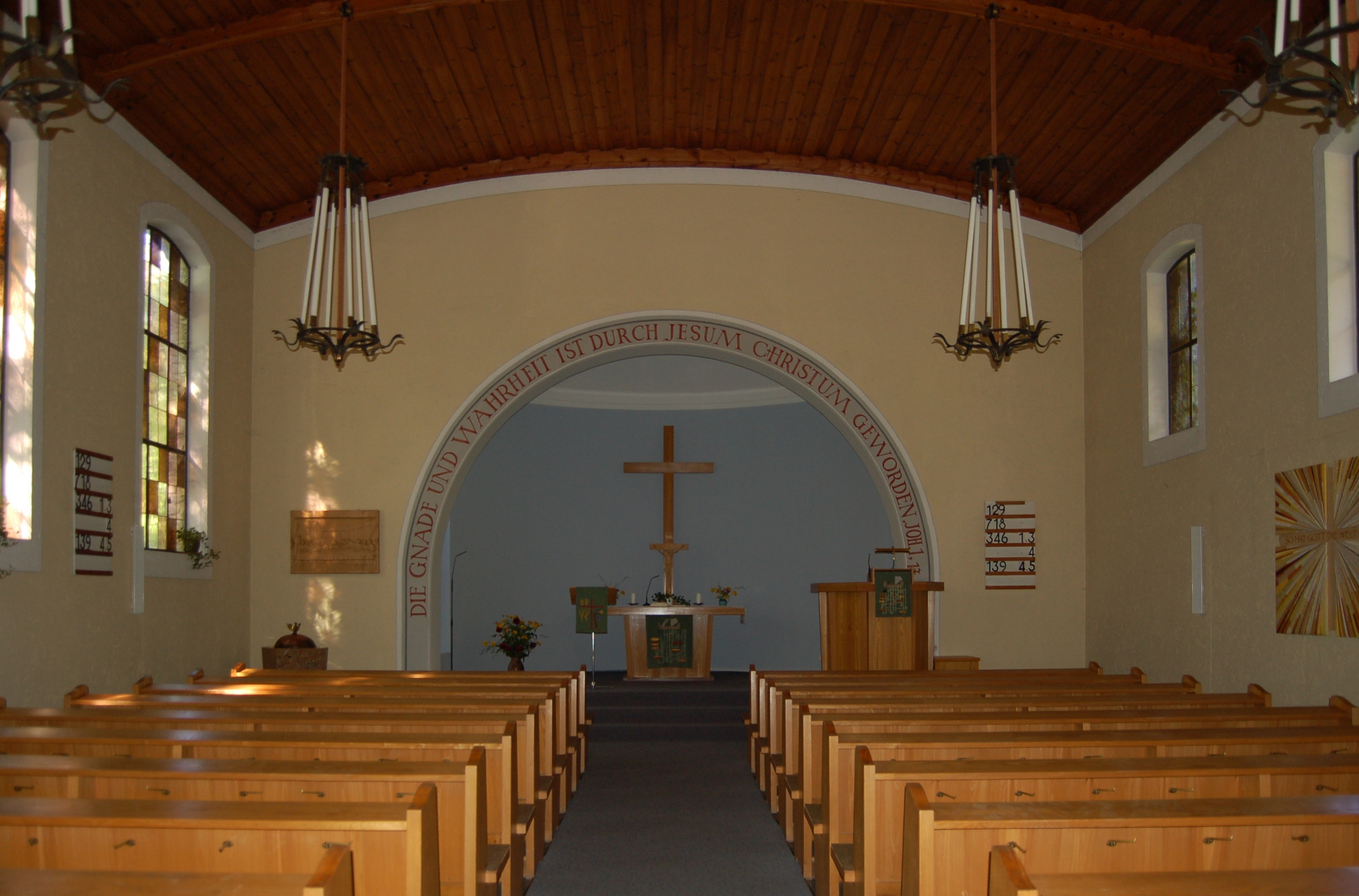 Die denkmalgeschützte, evangelische Martin-Luther-Kirche in Lienz (Amlacher Straße 14).